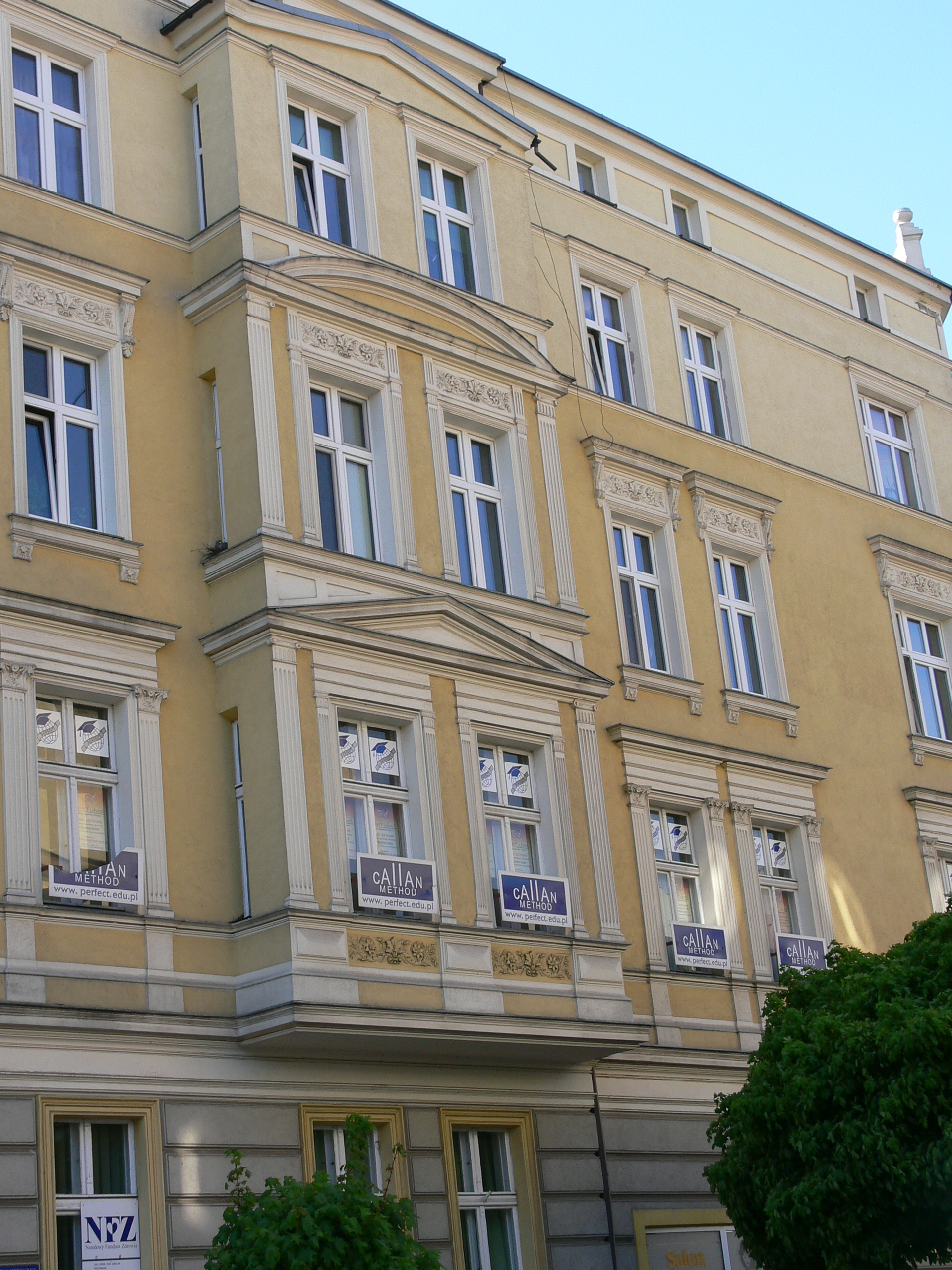 Racibórz - kamienica przy ul. Bema 1 - wykusze